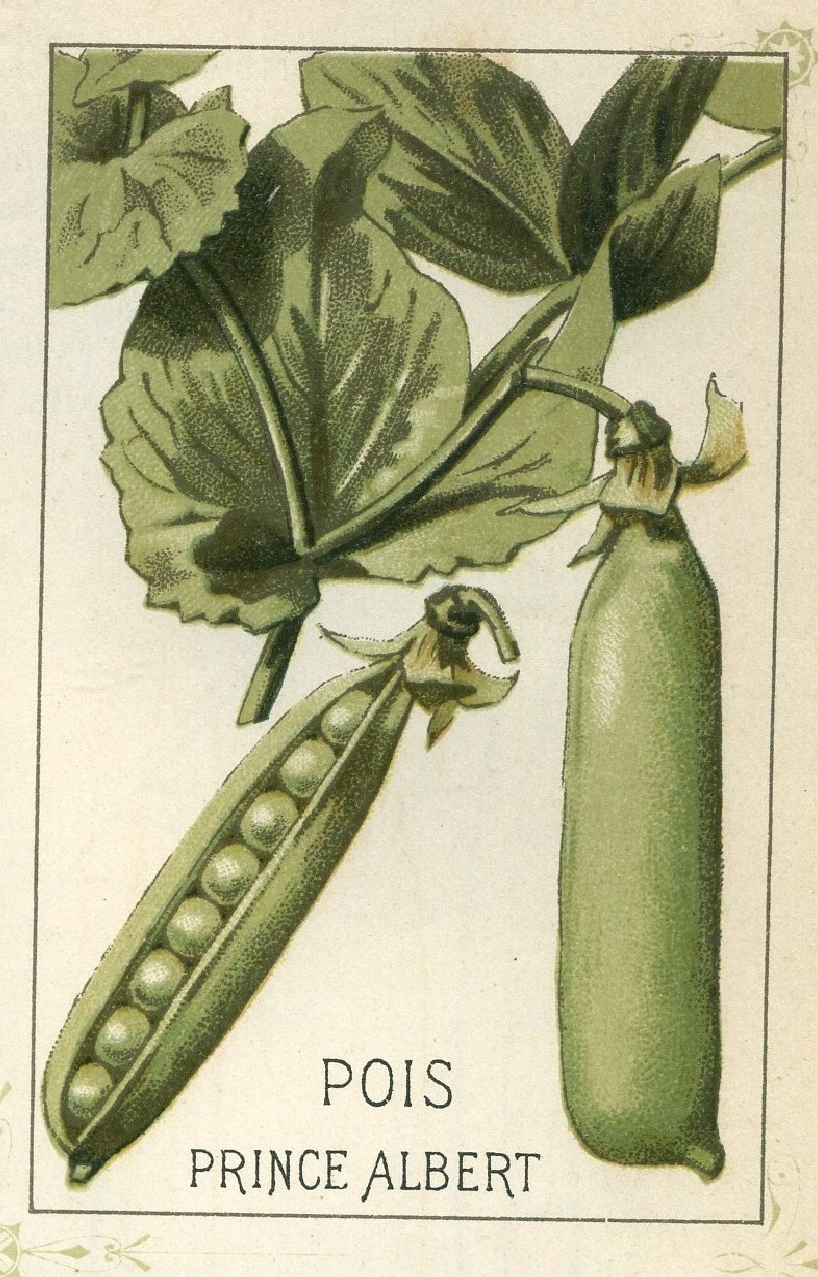 Variété de pois mangetout (Pisum sativum) 'Prince Albert'